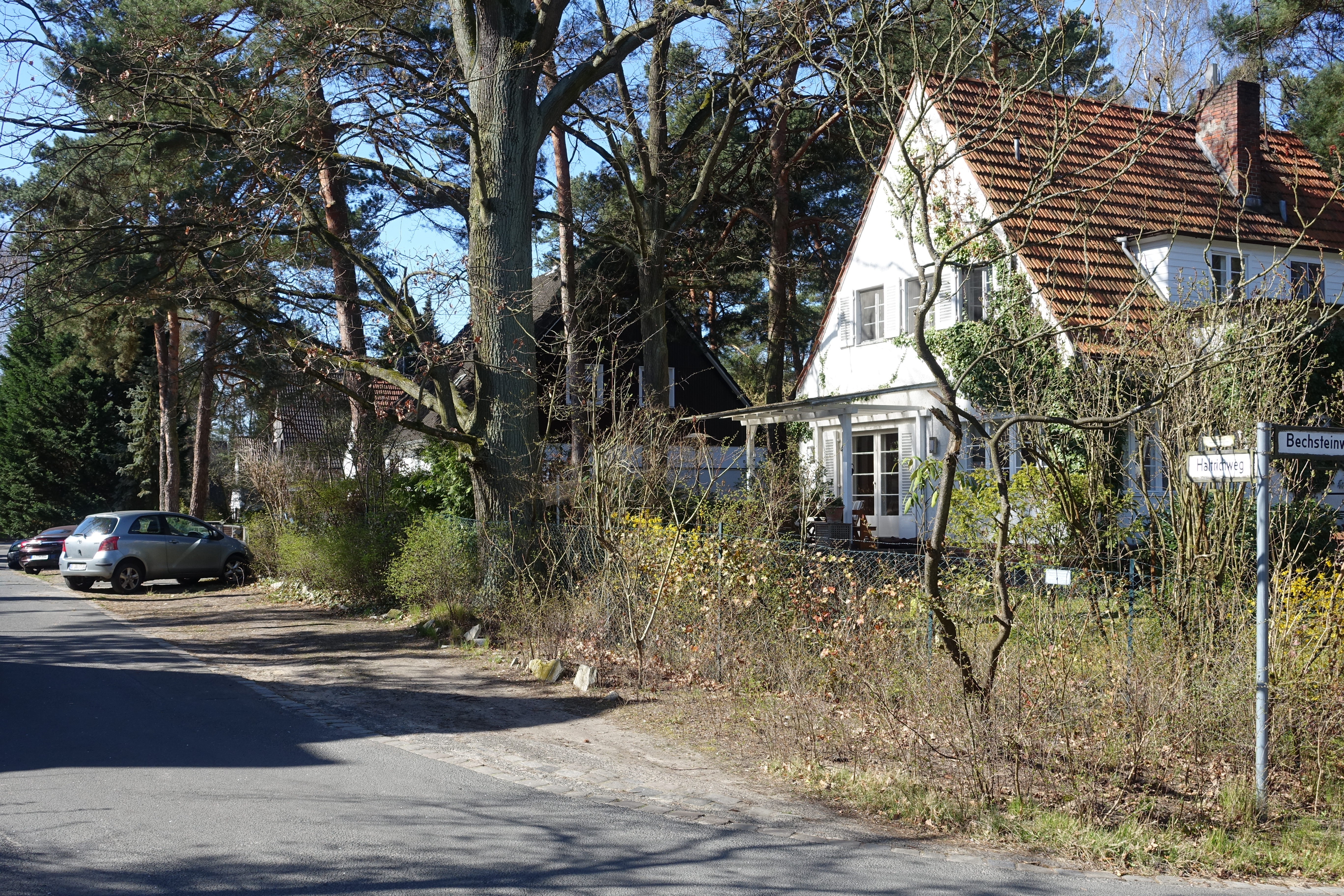 Straßenpanorama